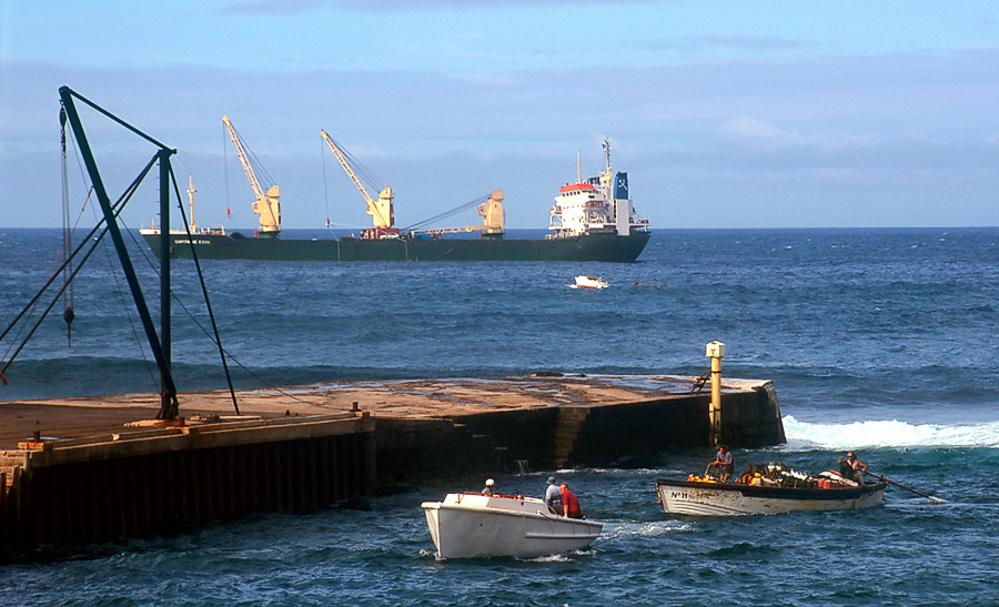 Jetty at Kingston, Norfolk Island.